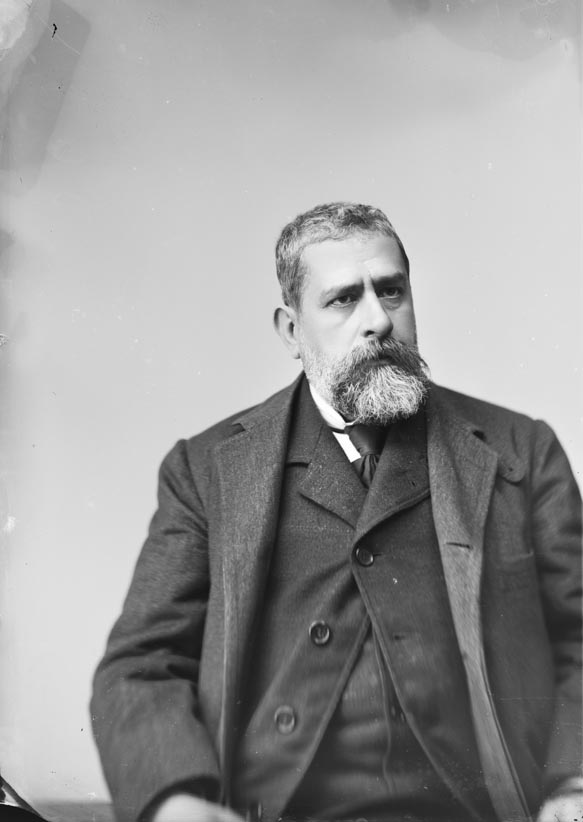 Retrat de mig cos de l'escriptor i polític Josep Roca i Roca.